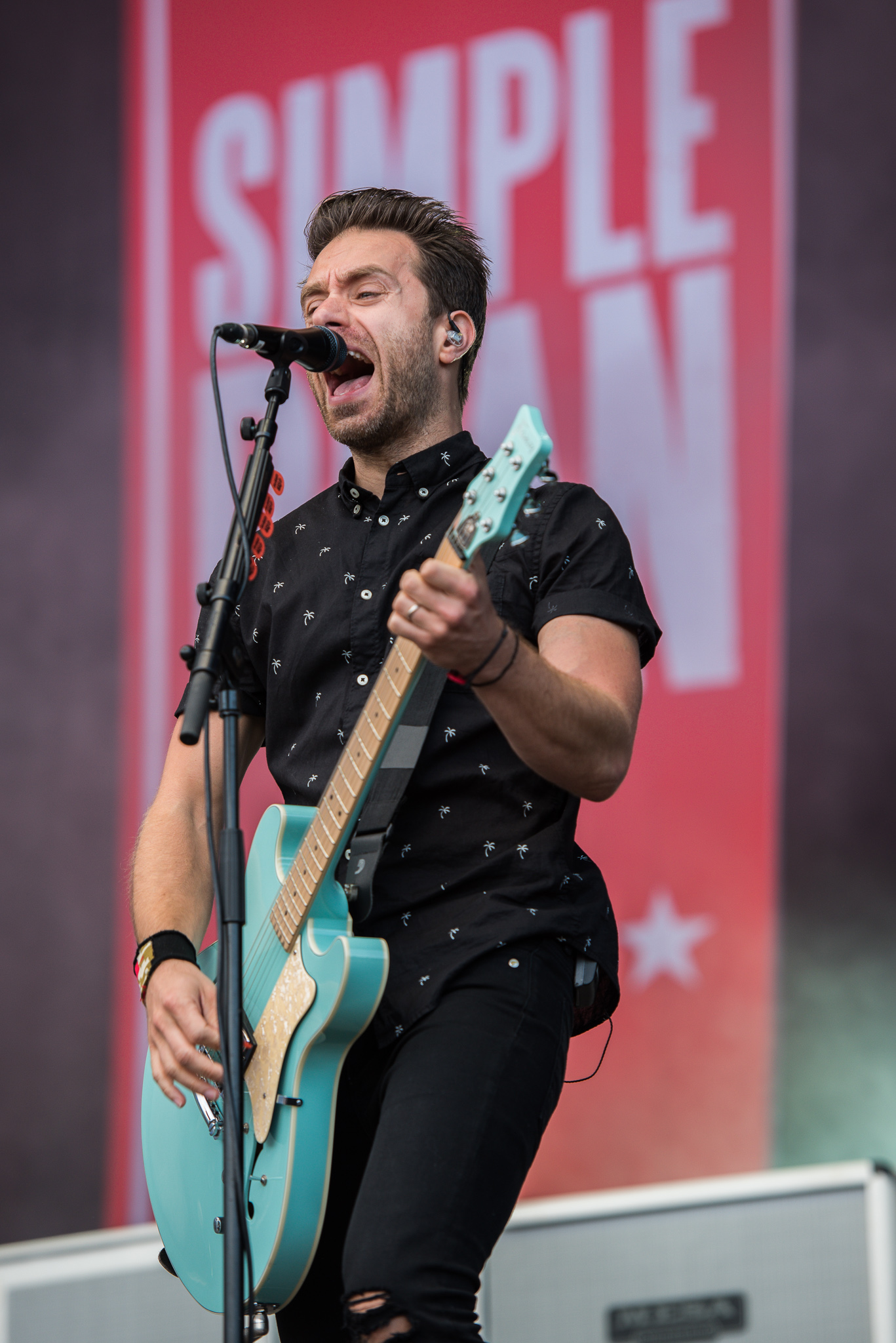 ARGO-Konzerte,Beck's Park Stage,Konzert,Livekonzert,Livemusik,Musik,RiP,Rock im Park 2017,Simple Plan,Sébastien Lefebvre